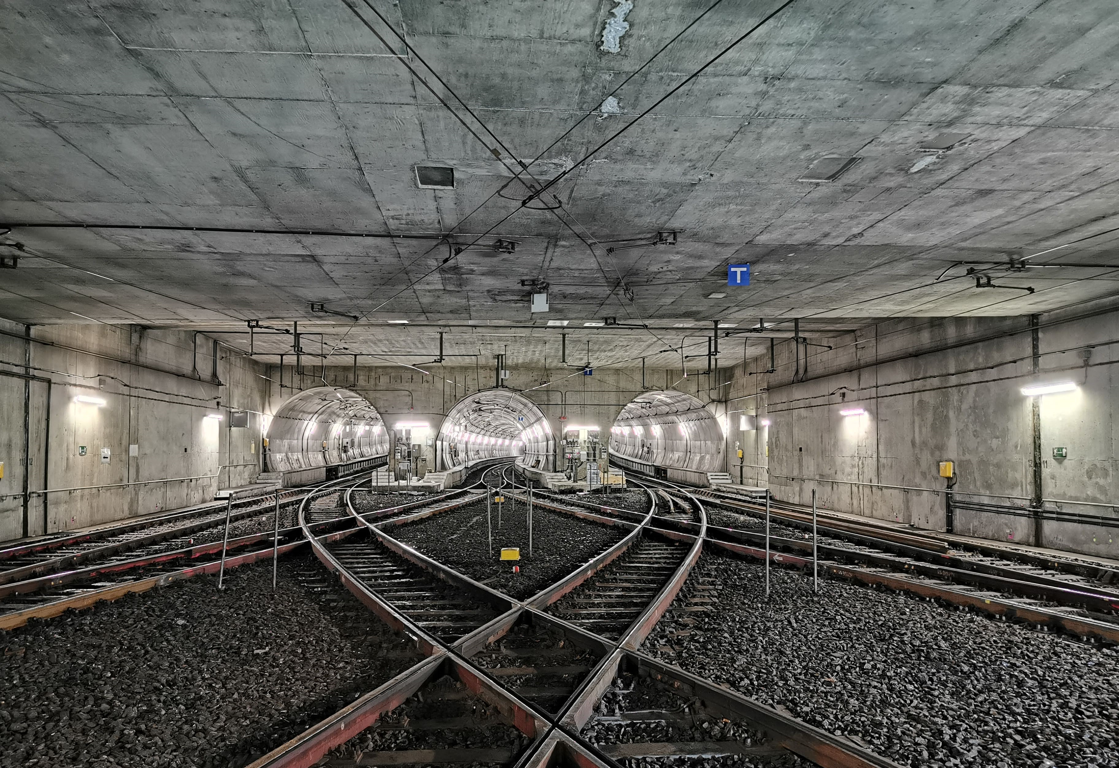 Blick in die Wendeanlage am Südbahnhof, Stadtbahn Frankfurt am Main, A-Strecke